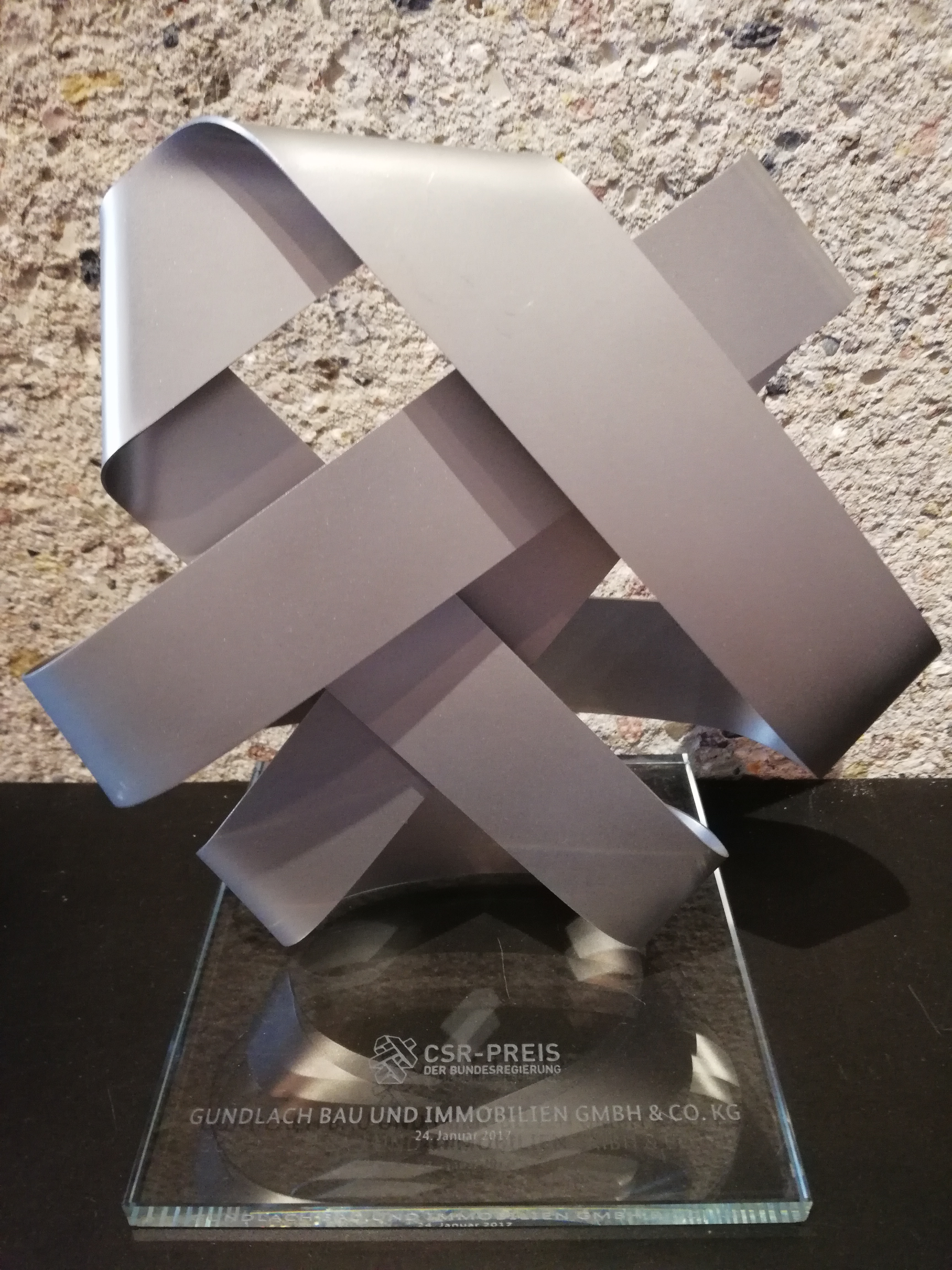 Der am 24. Januar 2017 an das Unternehmen Gundlach Bau und Immobilien für Corporate Social Responsibility (CSR) bzw. Unternehmerische Gesellschaftsverantwortung vergebene CSR-Preis der Bundesregierung ...